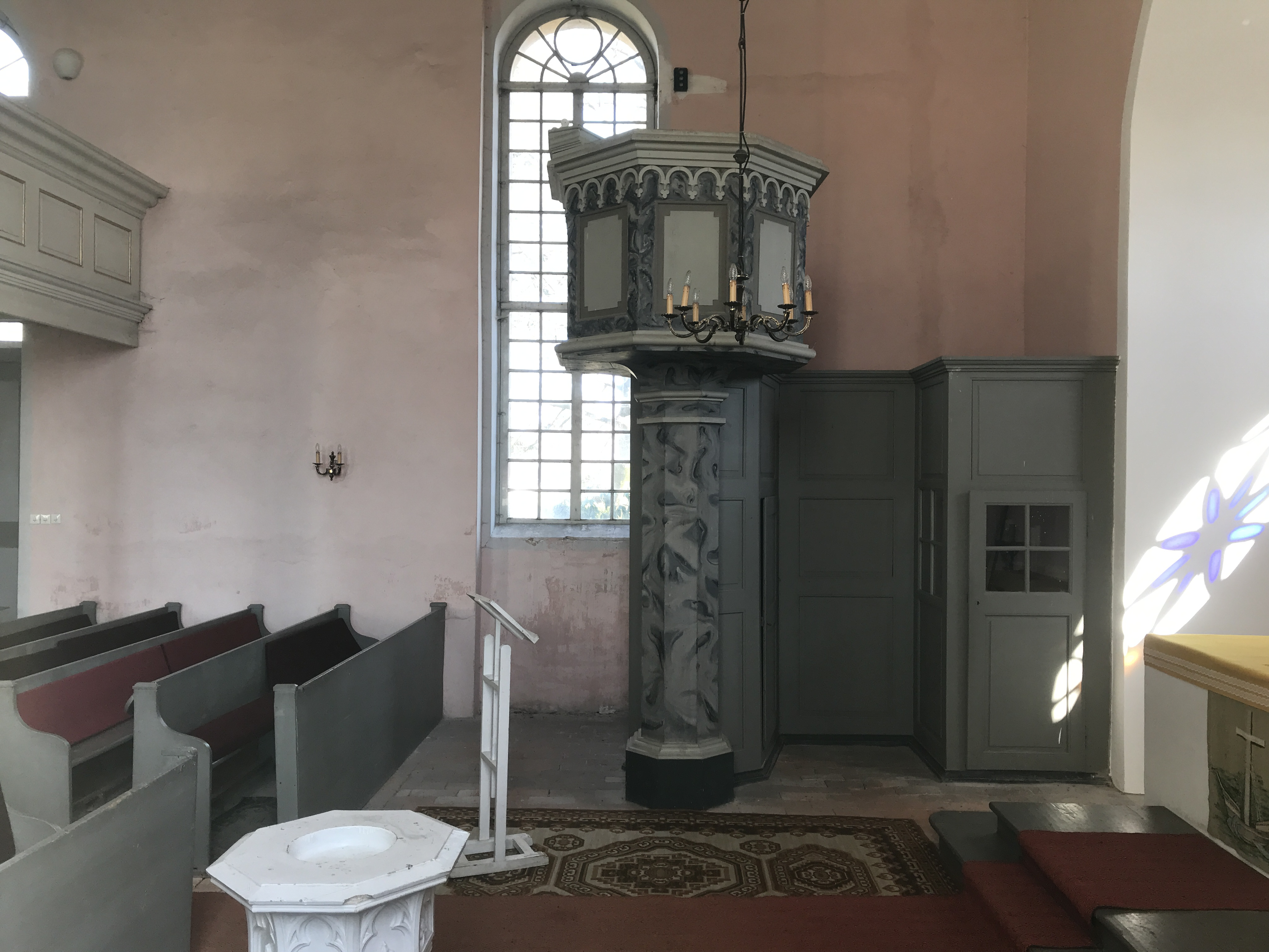 Die Dorfkirche in Gehren der Gemeinde Heideblick entstand in den Jahren 1823 bis 1825 als klassizistische Saalkirche auf einem Vorgängerbau aus dem 13. Jahrhundert.